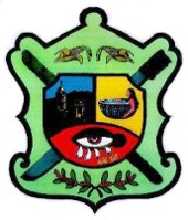 Escudo de Xalisco Nayarit